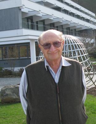 Foto di Guido Weiss